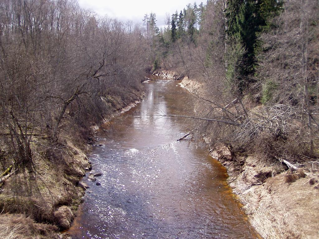 Tirza pie Smiltenes - Gulbenes ceļa 2007-04-06